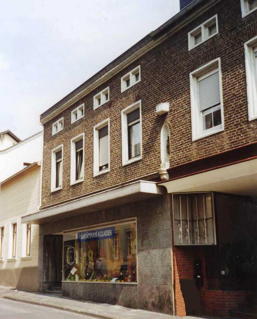 Gebäude der Eschweiler Rektoratsschule in der Grabenstraße 11